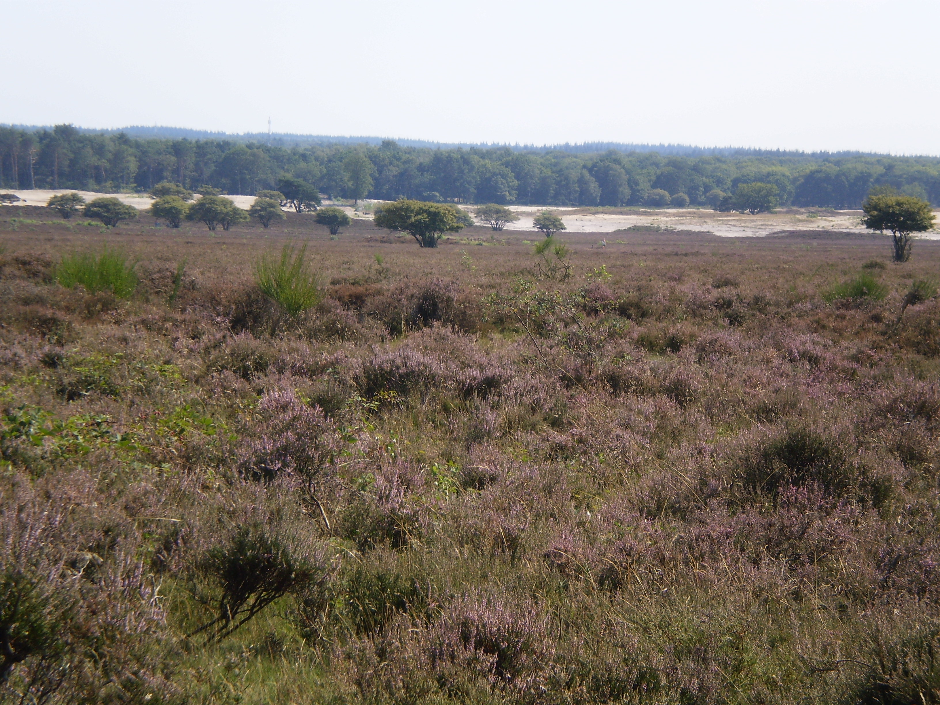 Foto oanbean troch Swarte Kees op 6 augustus 2009